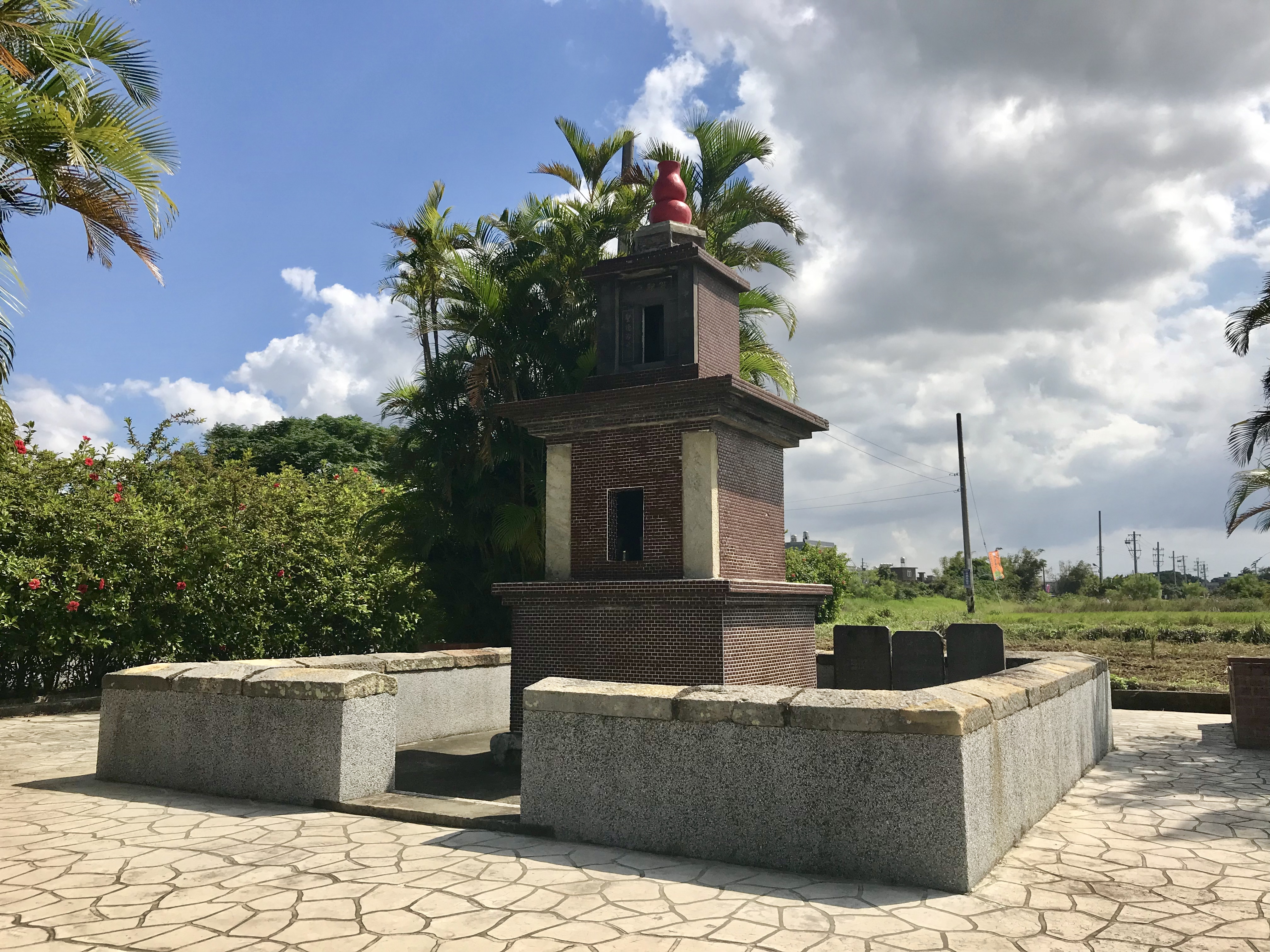 中文（台灣）: 新豐扶雲社孔聖亭斜照